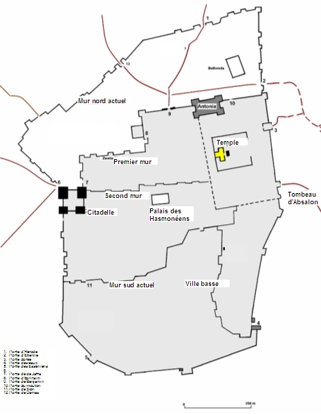 Jérusalem au premier siècle (traduit de la même image en allemand)